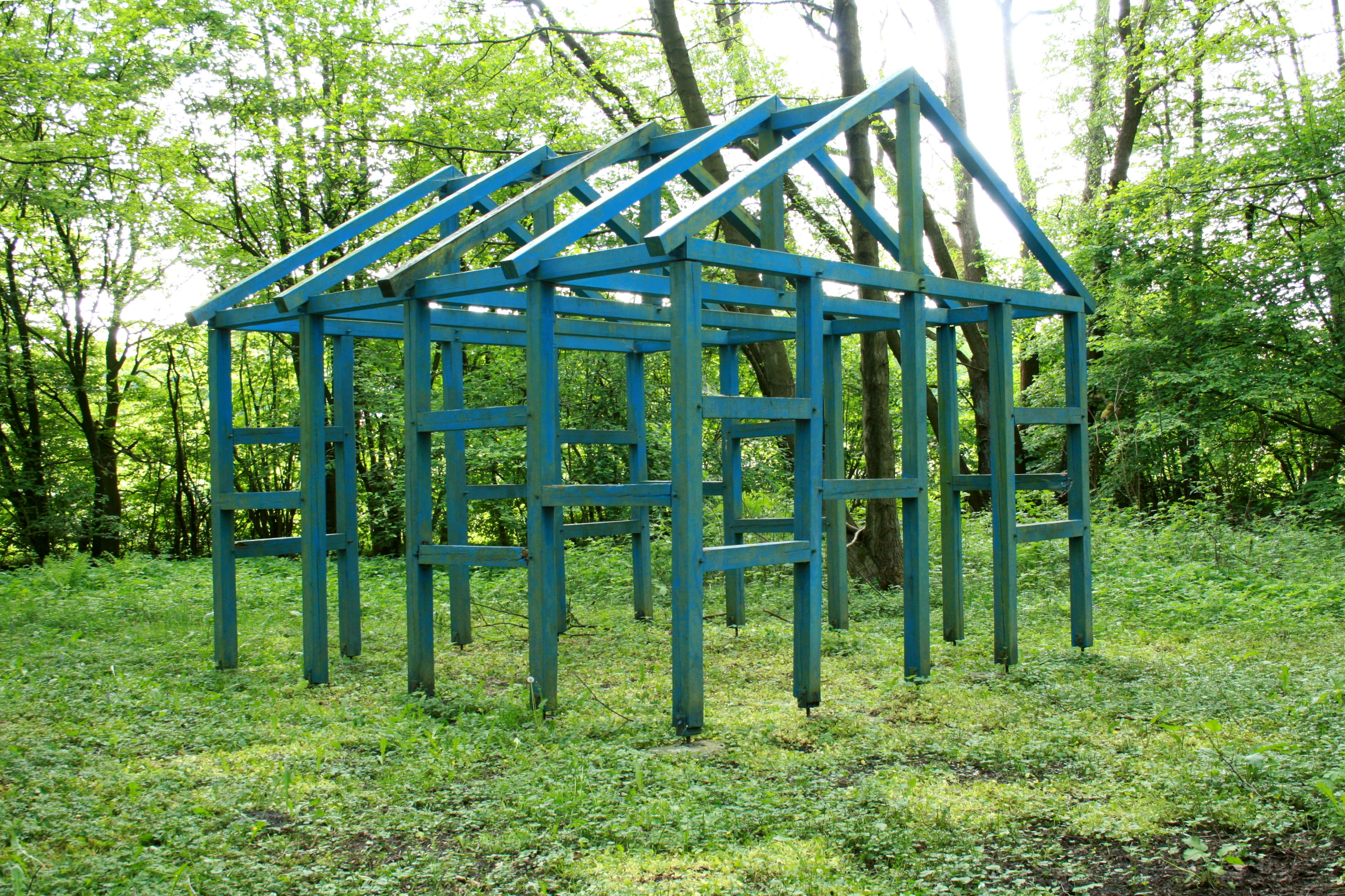 „Das blaue Haus“, Skulptur von Horst Lerche im Projekt Kunst-Landschaft des Kunstvereins Springhornhof in Neuenkirchen (Lüneburger Heide)